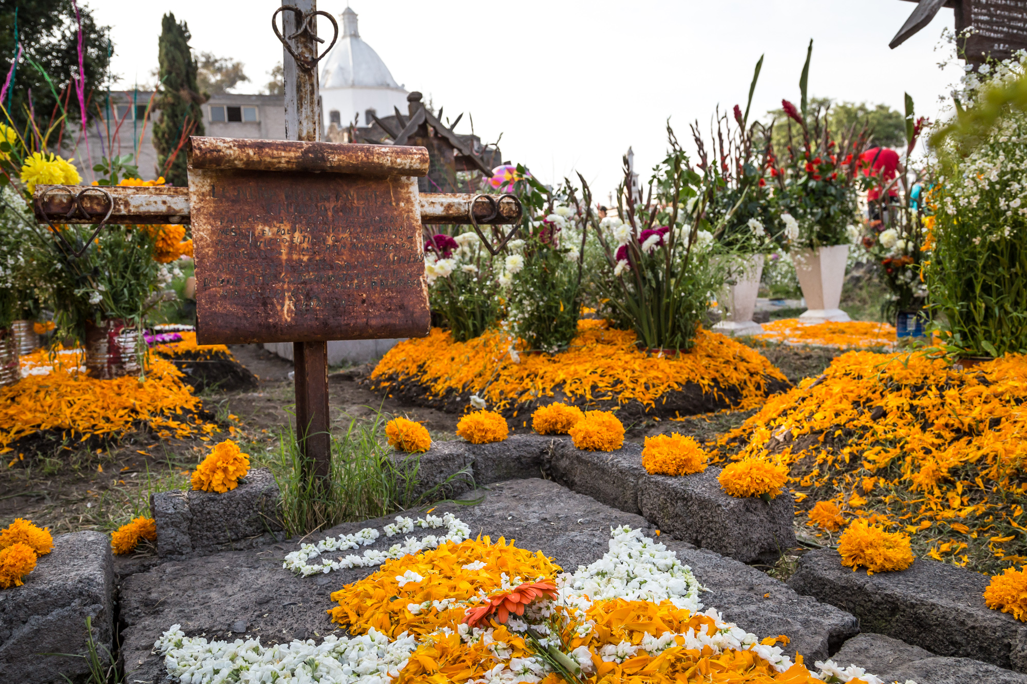 ¿Quién?: Habitantes del pueblo de Mixquic ¿Qué pasa?: Festival del Día de Muertos Lugar: Mixquic, Distrito Federal, México Tomada con Canon 6D y 24-105 f/4L